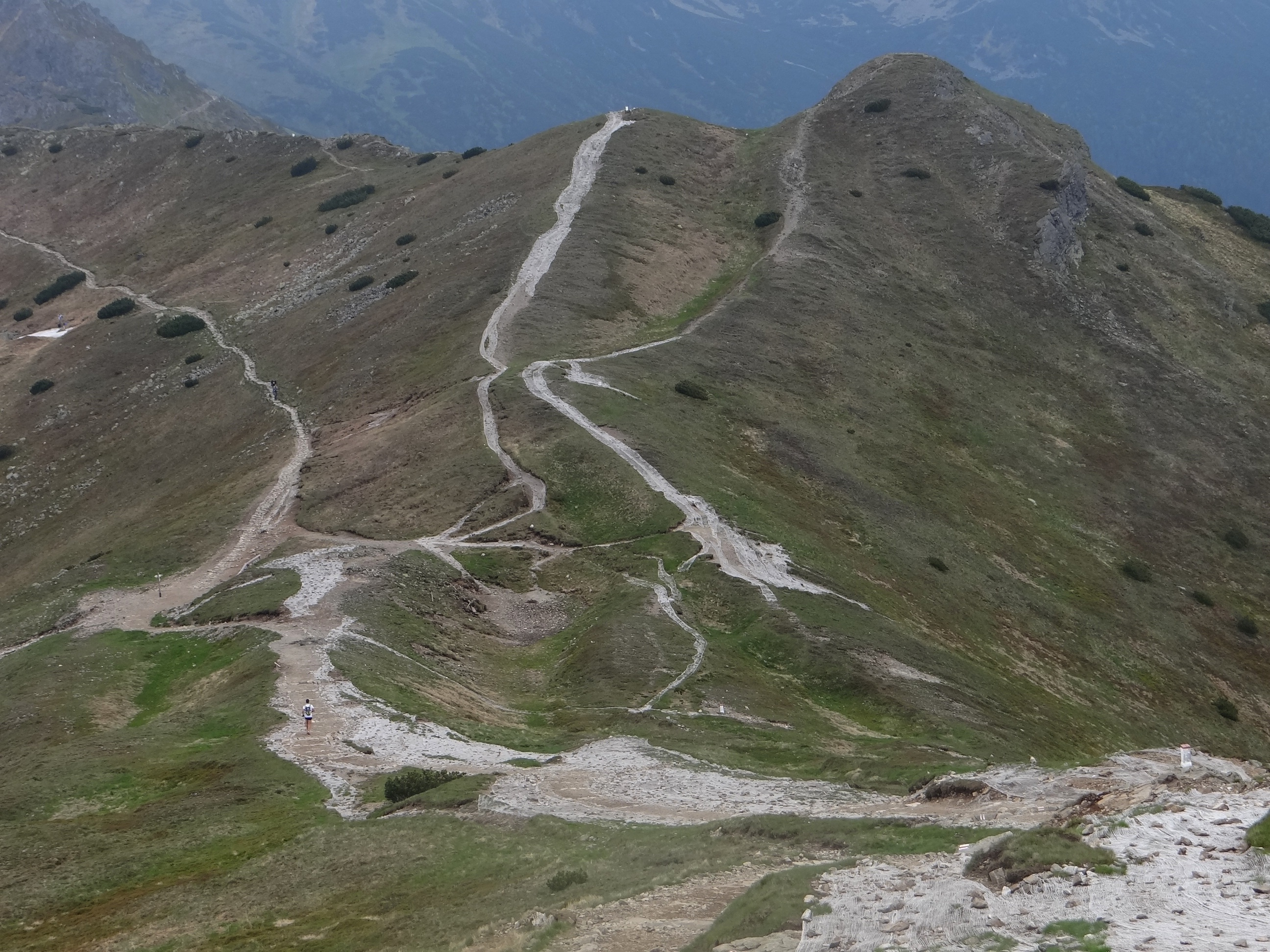 Przełęcz pod Kopą Kondracką T90.jpg